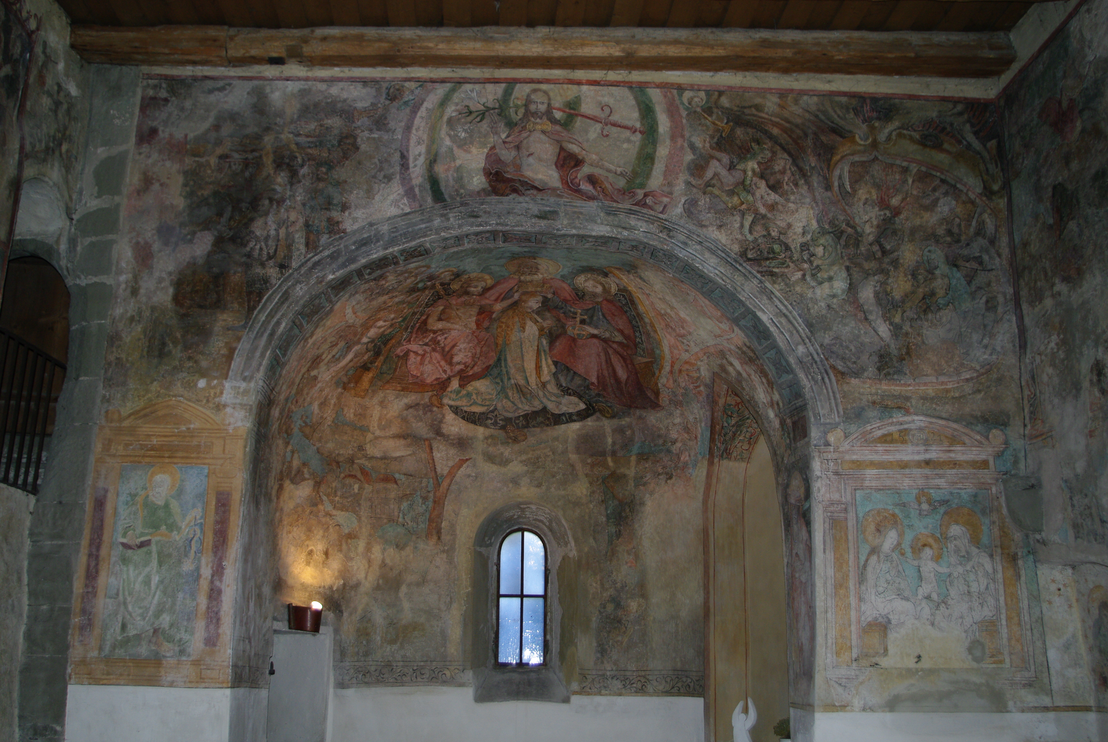 Chorbogen der Peterskirche.